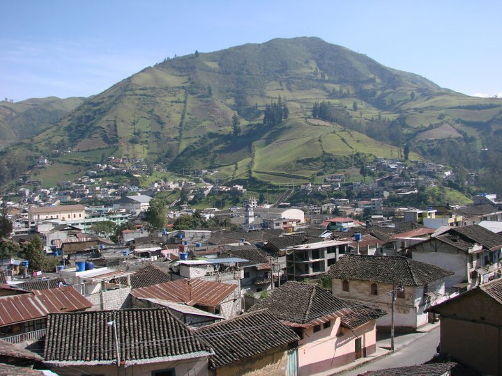 S.J Chimbo